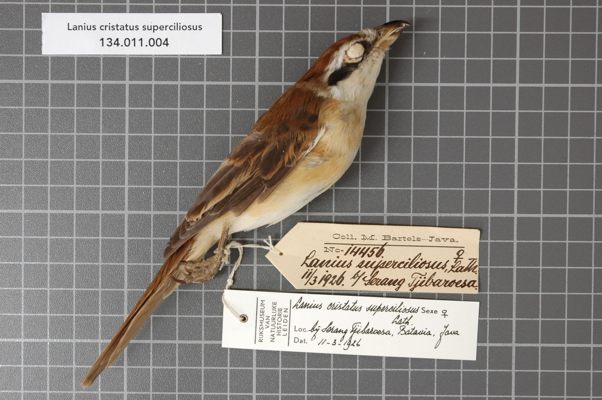 Lanius cristatus superciliosus Latham, 1801